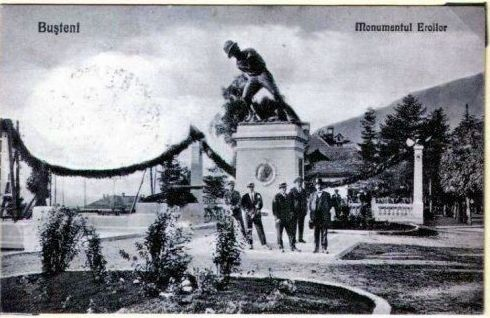 Monumentul Eroilor din Bușteni cunoscut și ca Monumentul Ultima grenadă din Bușteni îl înfățișează pe caporalul Constantin Mușat care aruncă cu brațul drept ultima grenadă. Această imagine este o carte poștală circulată.